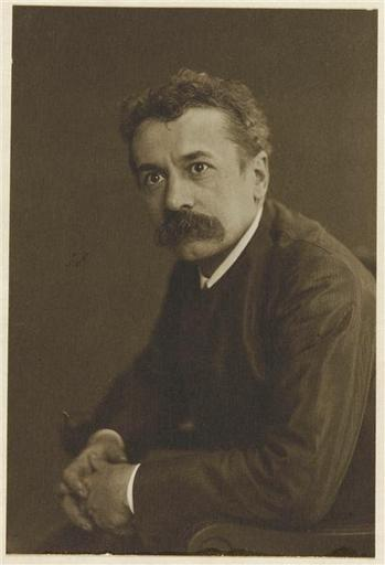 Portrait de René Lalique par Aaron Gerschel